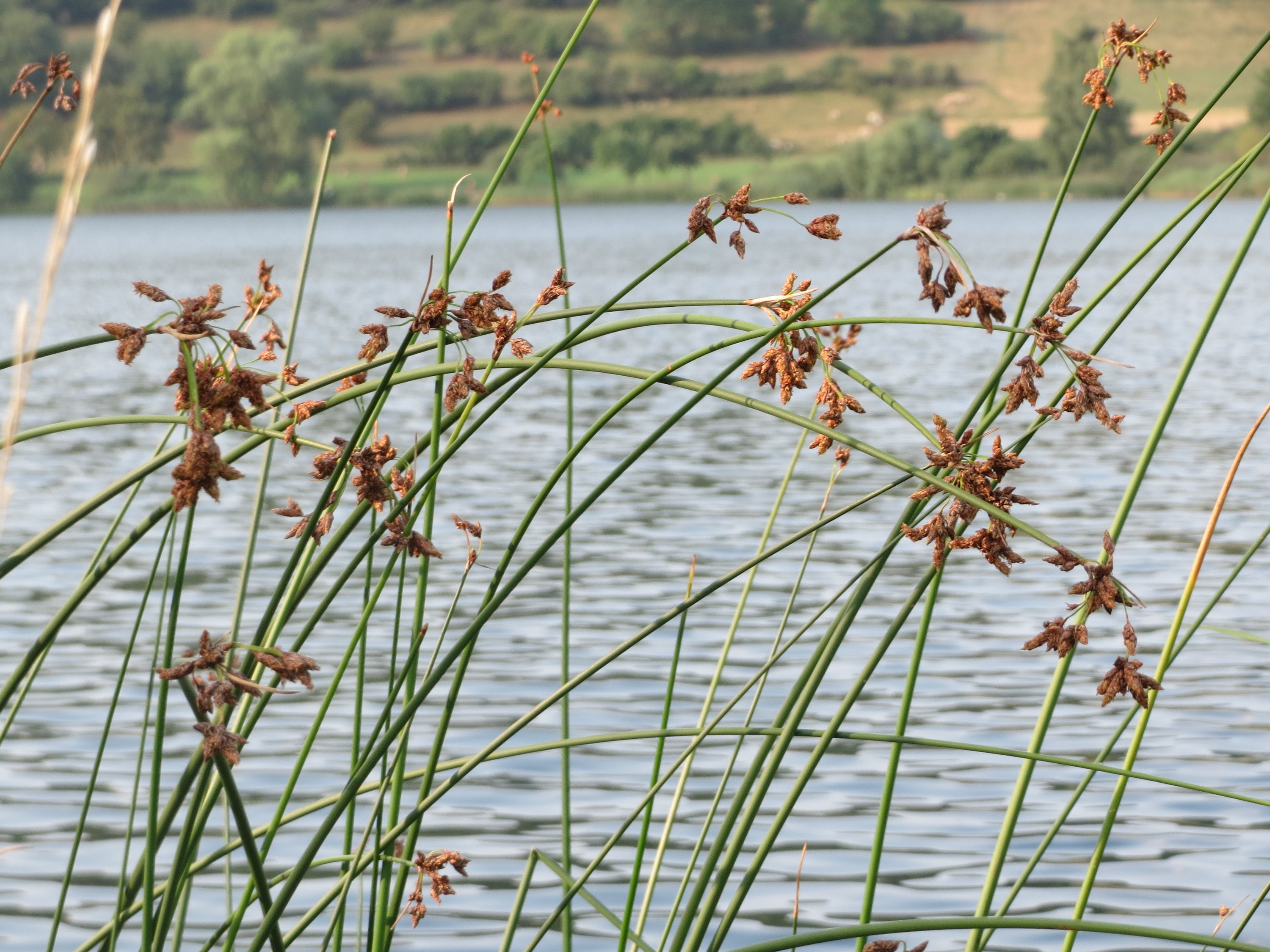 Gewöhnliche Teichbinse (Schoenoplectus lacustris) am Schalkenmehrener Maar